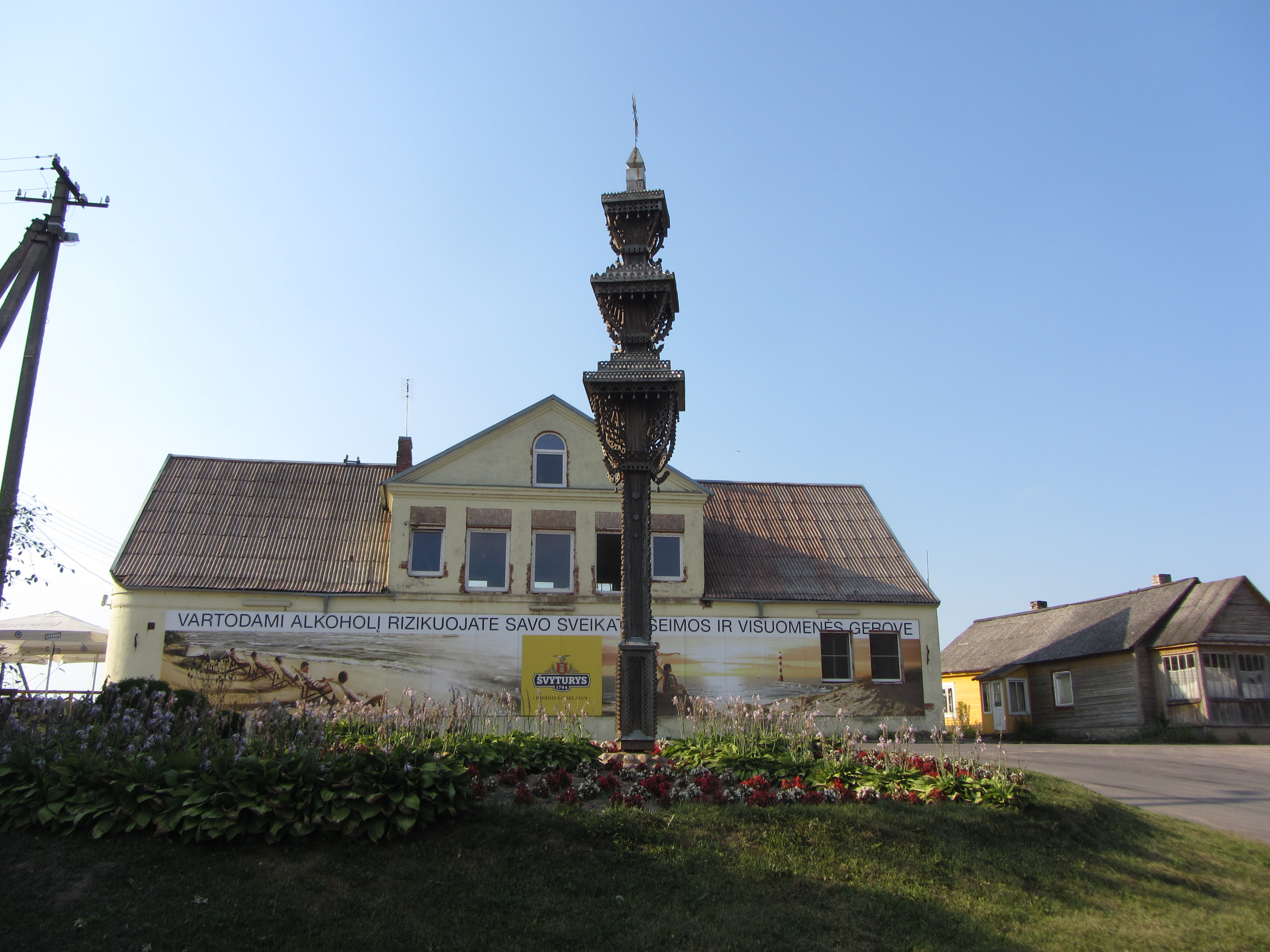 Tauragnai, Lithuania